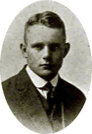 George Fish en 1915 alors qu'il est à l'Université de Californie à Berkeley.